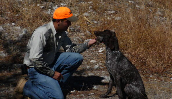 Pointer Alemán de pelo corto entregando al cazador su pieza "cobrada"